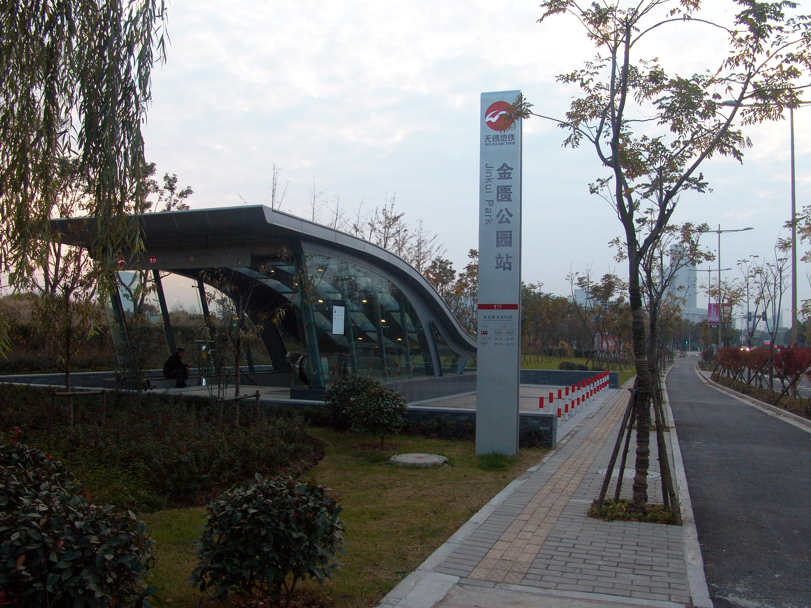 無錫地鐵金匱公園站2號出入口